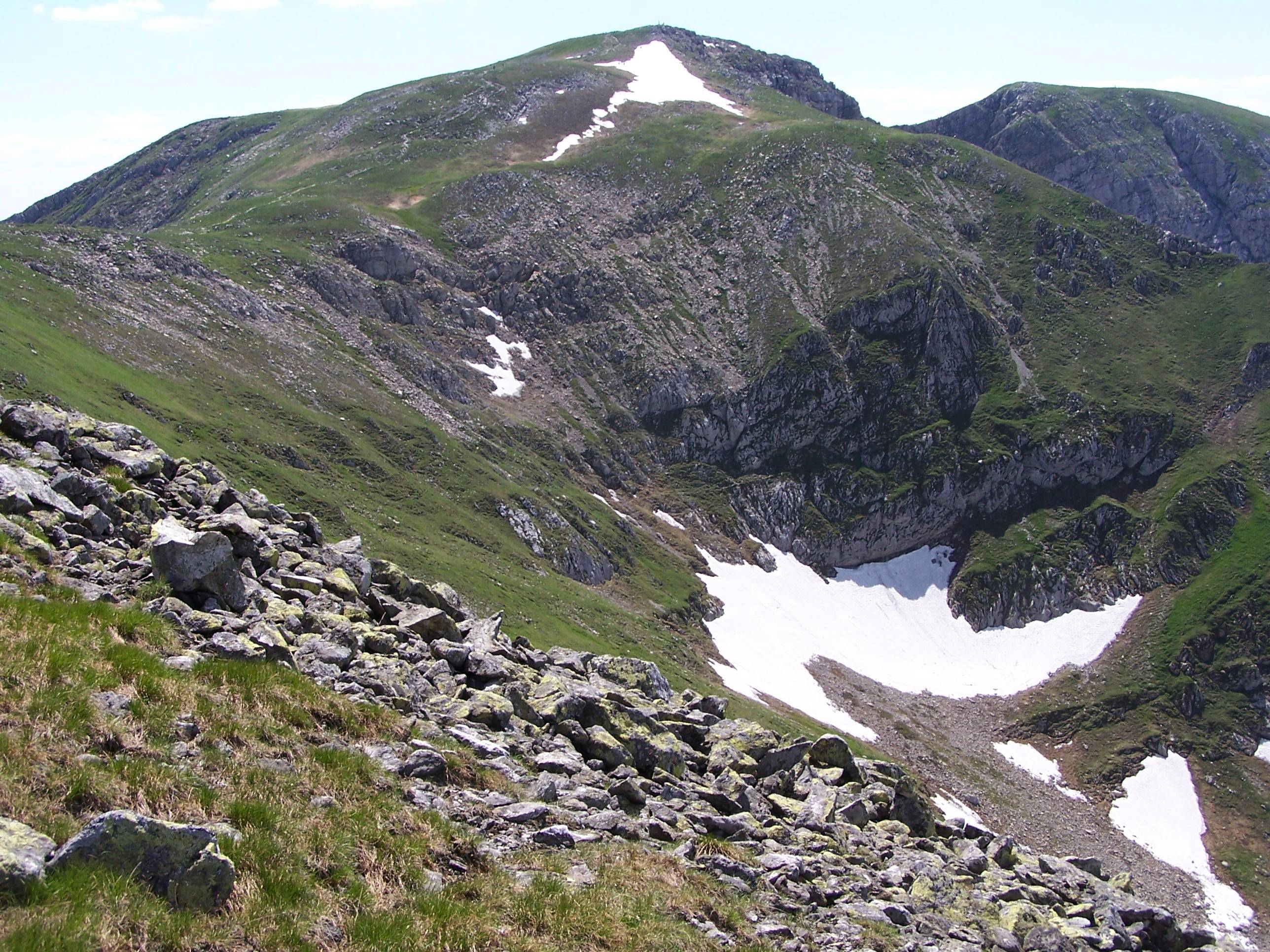 Dolina Litworowa (polska) (Tatra Mountains, Czerwone Wierchy)